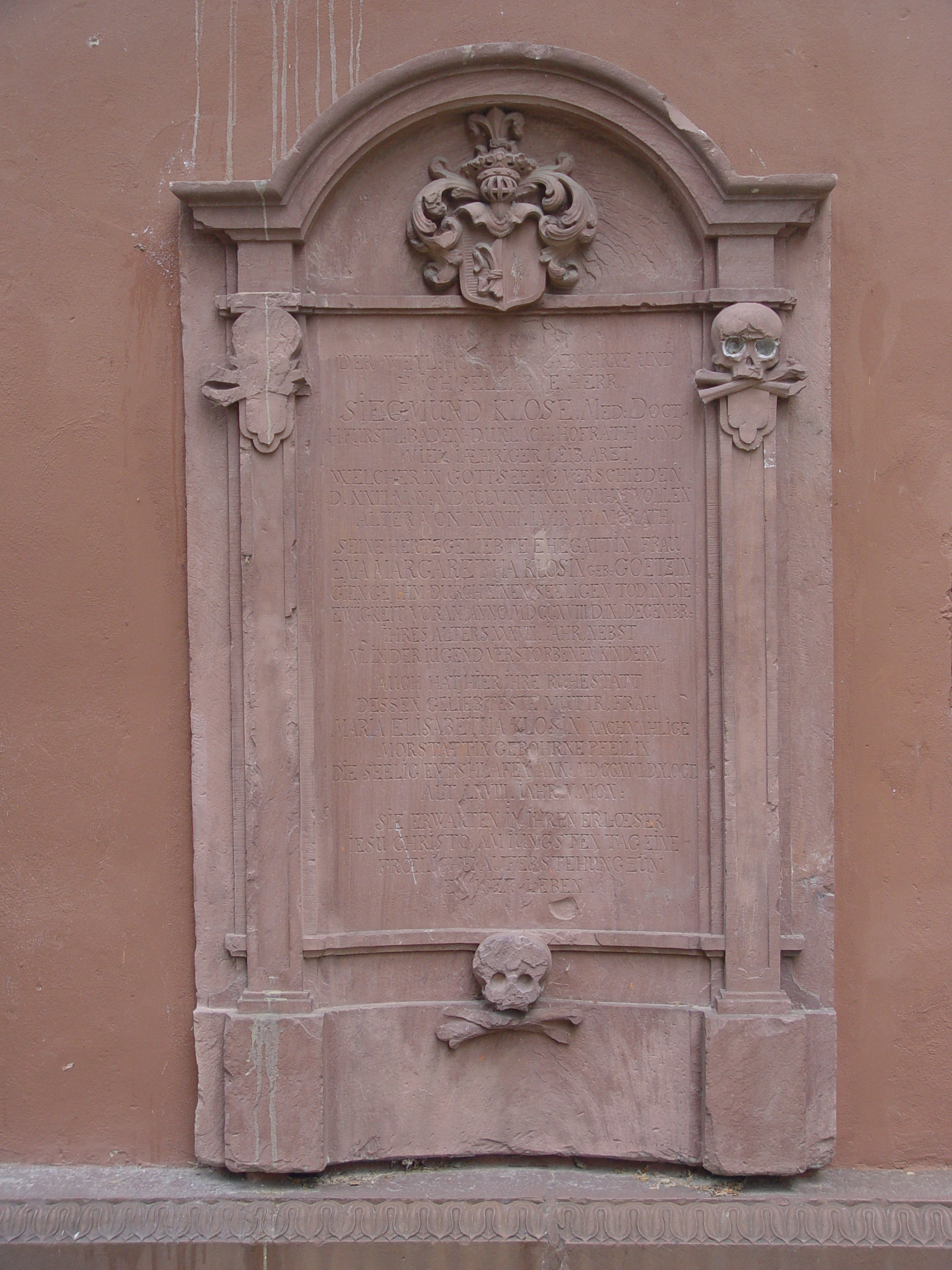 Grabplatte II